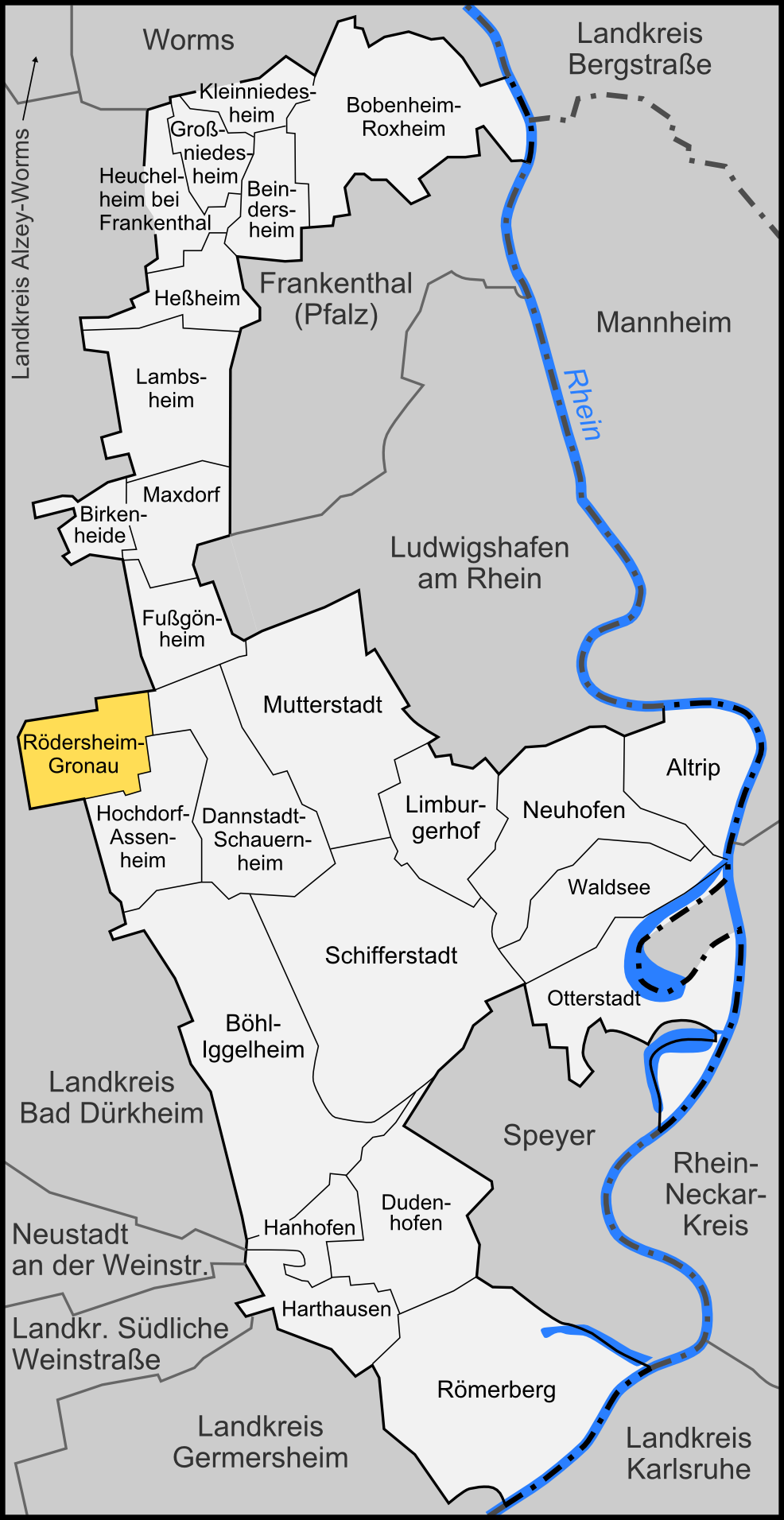 Karte der Gemeinde Rödersheim-Gronau im Rhein-Pfalz-Kreis